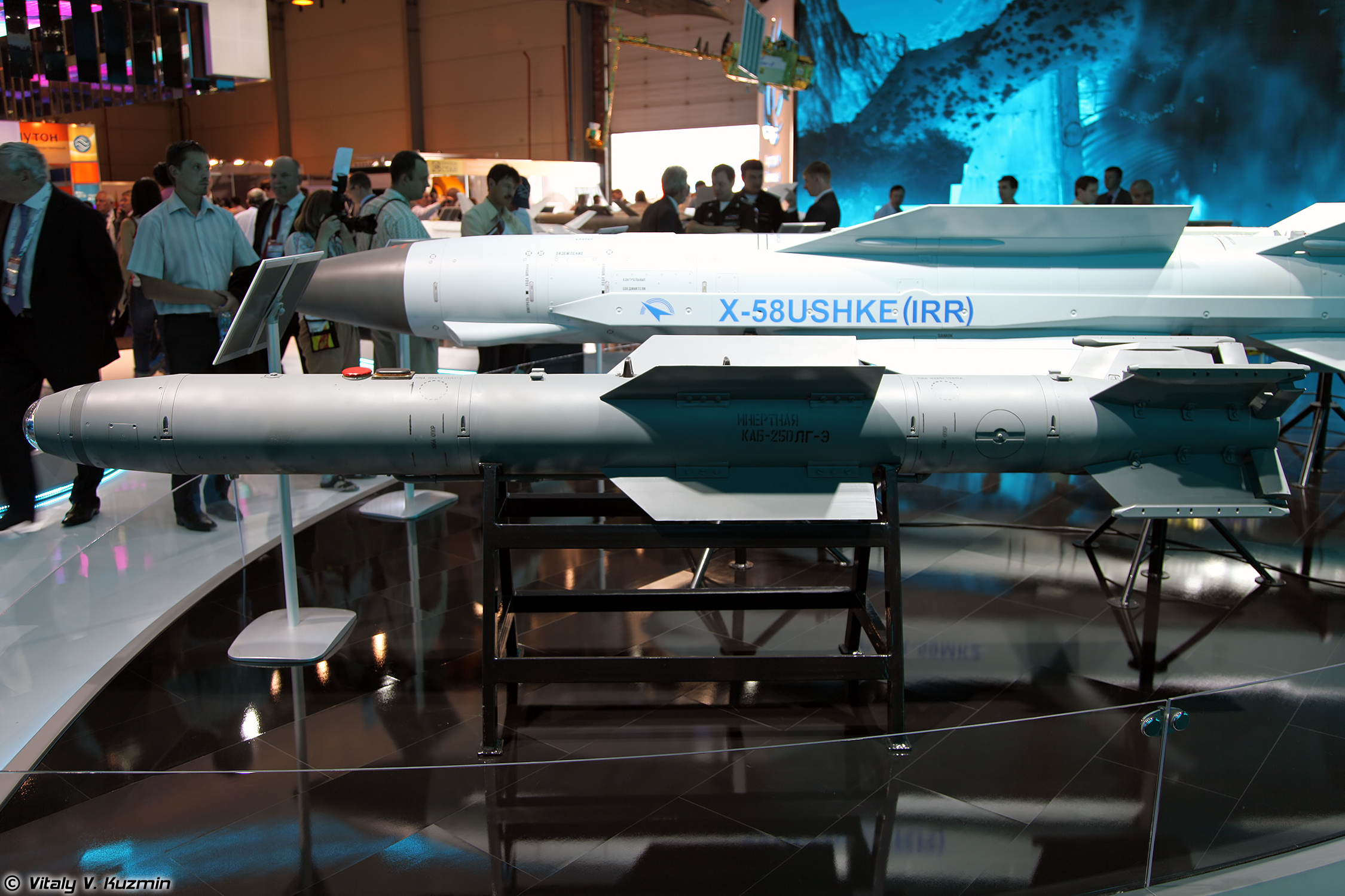 Авиабомба КАБ-250ЛГ-Э